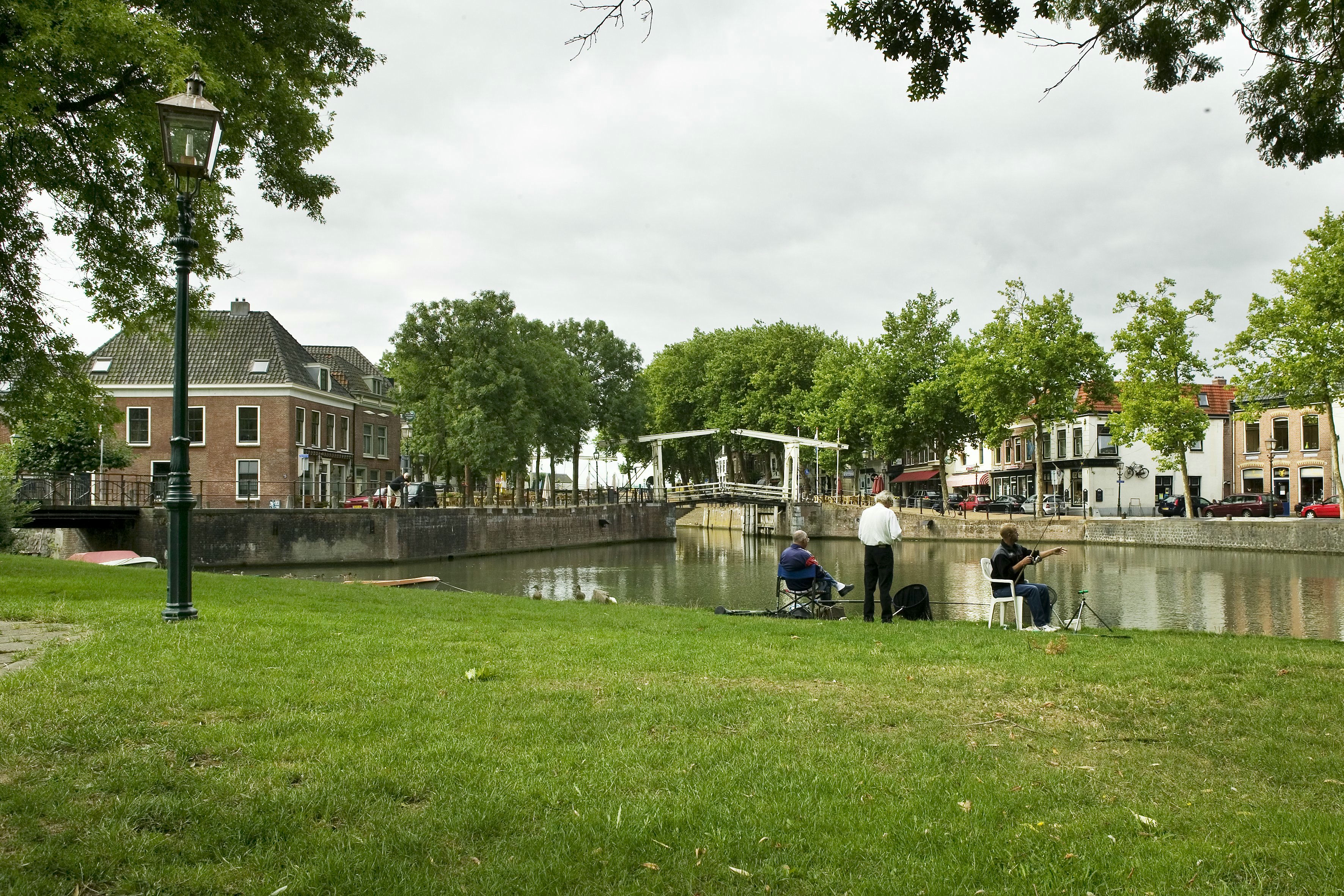 Oude Sluis: Overzicht Oude Sluis richting dorp